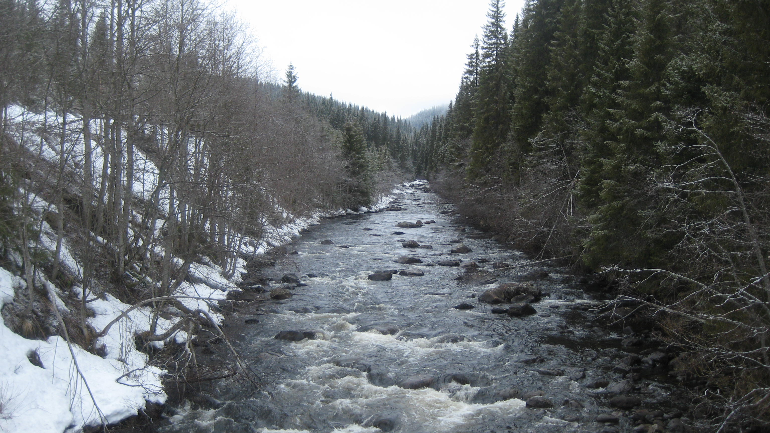 Bildet er tatt fra brua over Livasselva på Vestergardsvegen